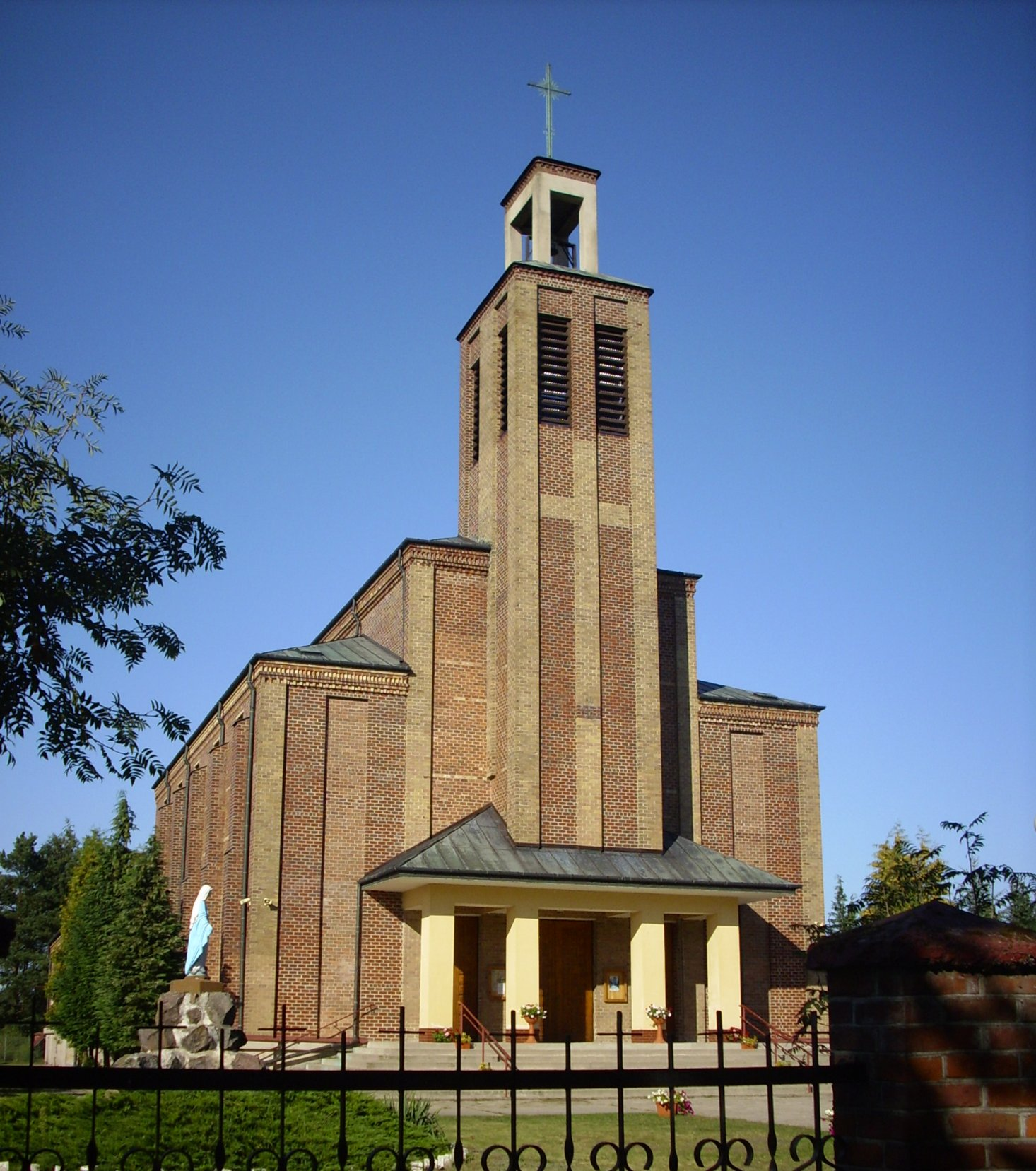 Manie (powiat bialski, woj. lubelskie, Polska). Rzymskokatolicki kościół pw. Matki Boskiej Nieustającej Pomocy.